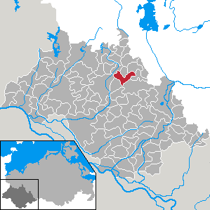 Hoort in Mecklenburg-Vorpommern - district Ludwigslust